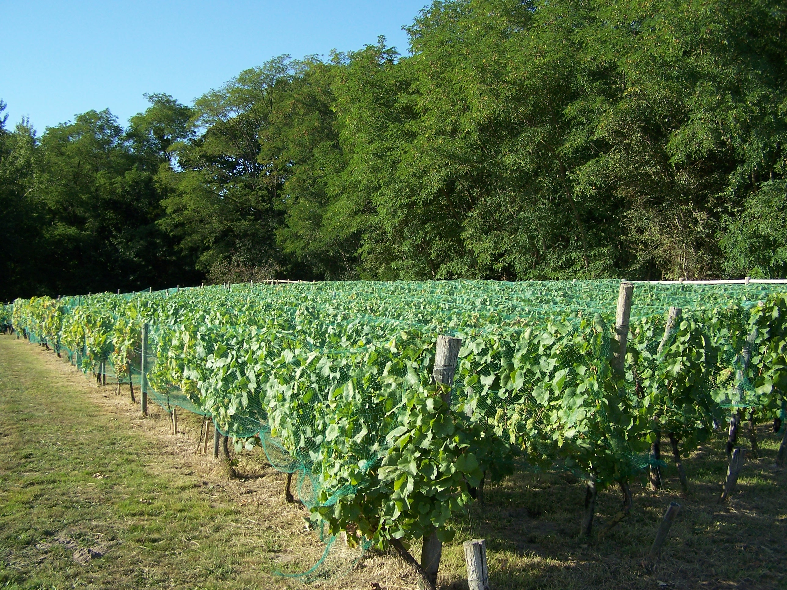 Vignoble d'Auteuil (Yvelines, France)